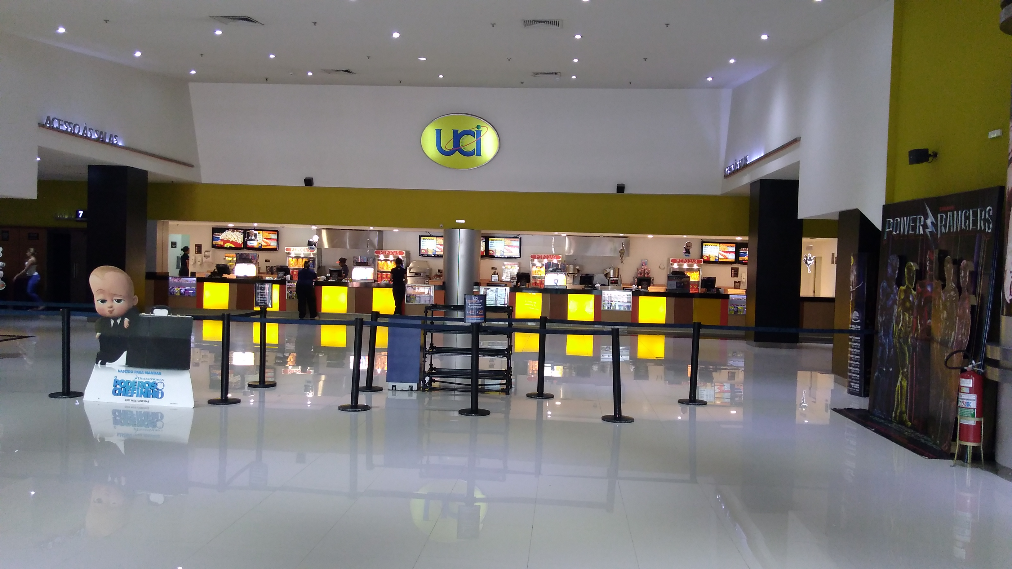 Vista do foyer do UCI Jardim Sul de São Paulo, capital